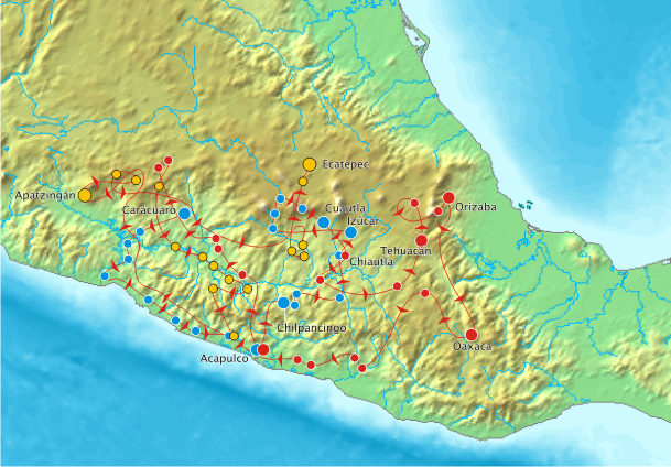 Ruta de la campaña de Morelos (1811-1815), correspondiente a la segunda fase de la Guerra de Independencia de México